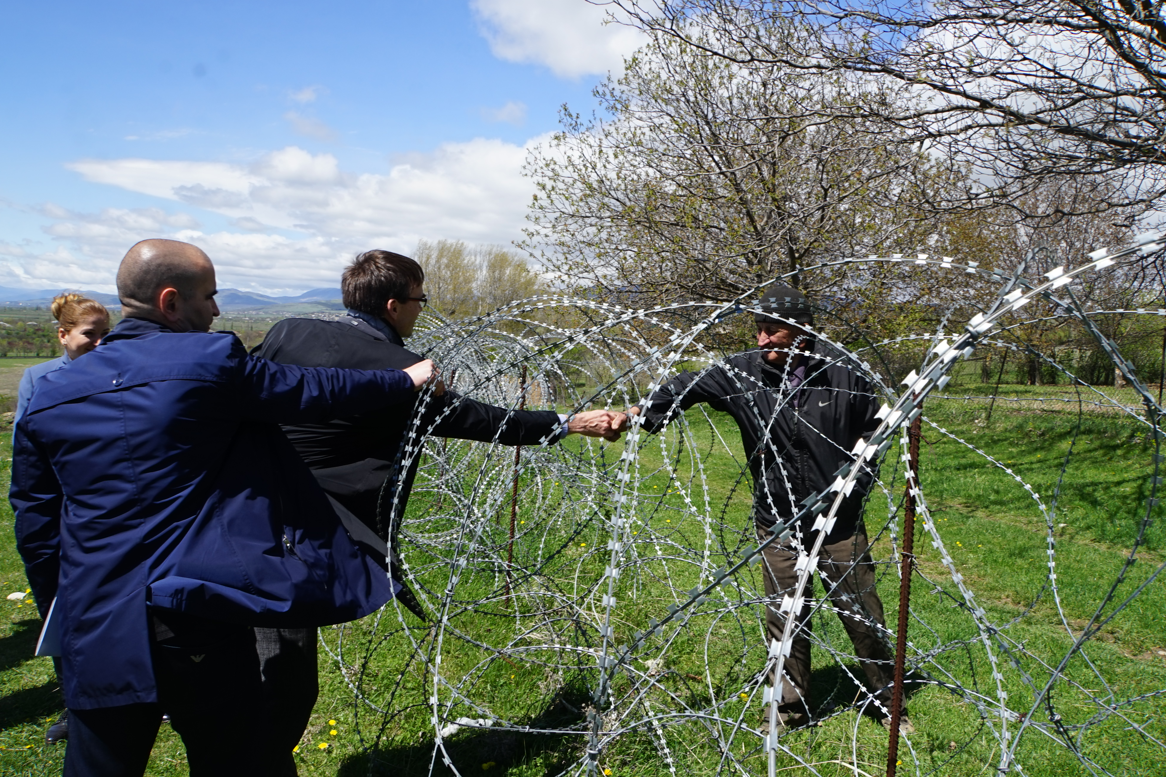 Välisminister Mikser külastas Khurvaletis Gruusia ja Lõuna-Osseetia administratiivjoont Sven Mikser visit to Georgia, April 2017